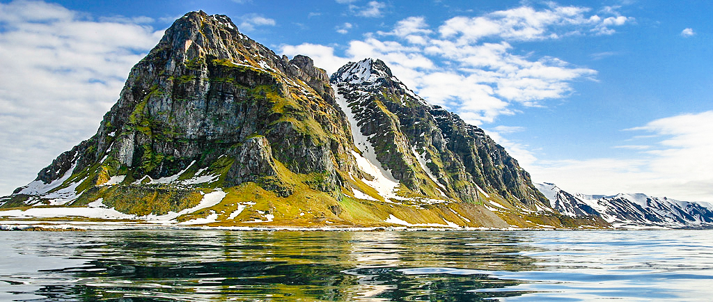 Nordspissen av Prins Karls Forland, Svalbard